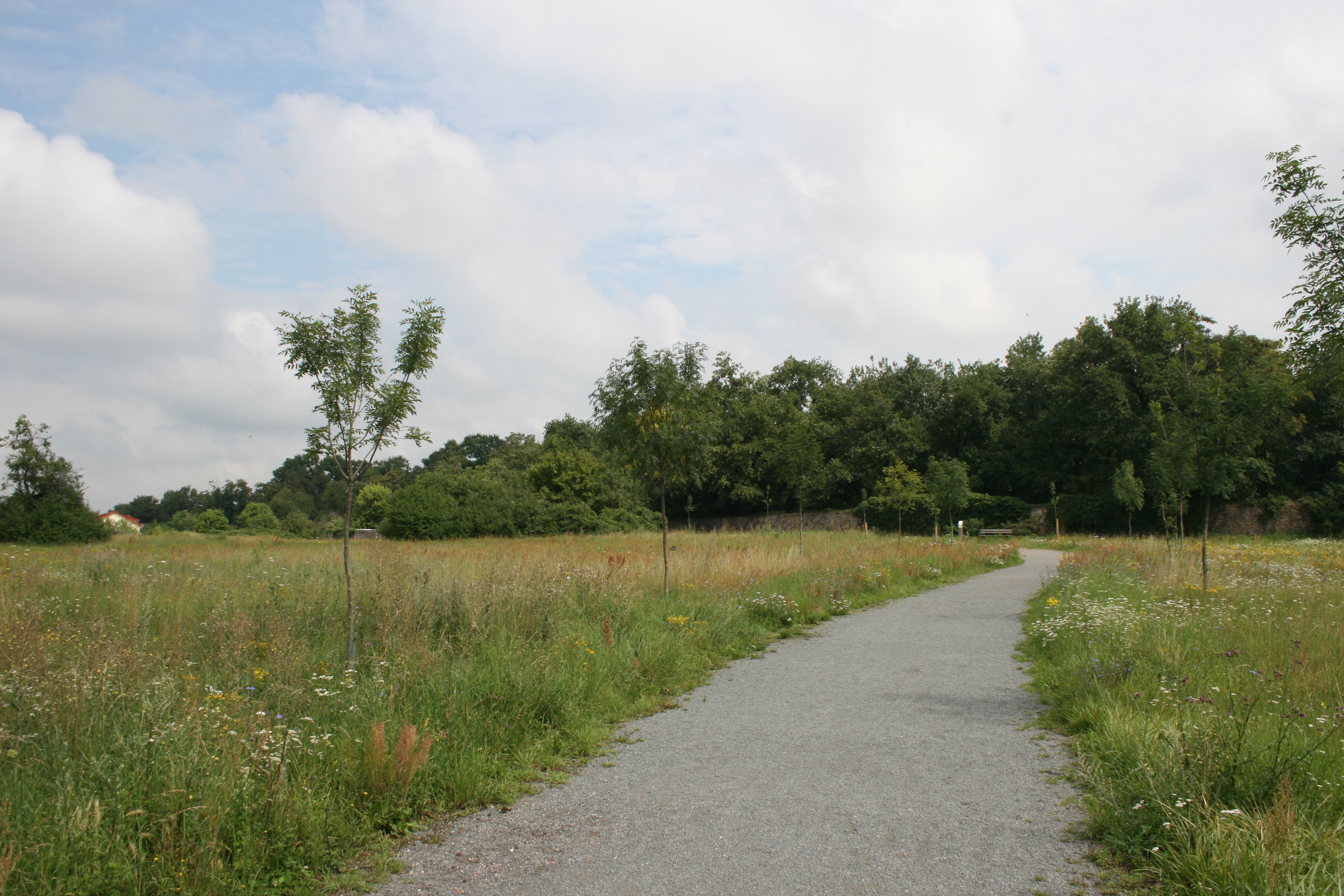 Blick auf das Areal des Römerkastells Groß-Gerau-"Auf Esch" 2011